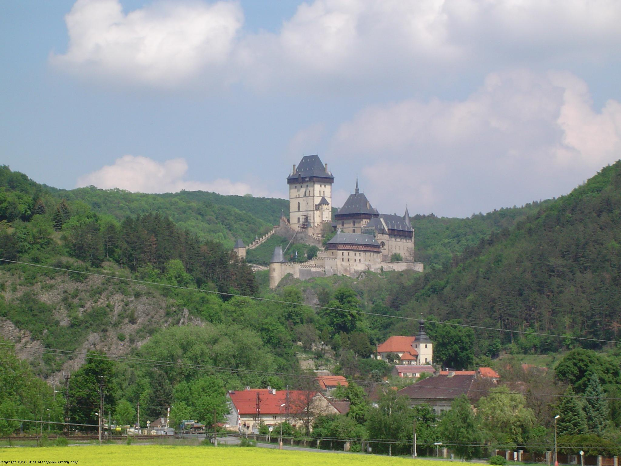 Le château de Charles IV à Karlstejn en République Tchèque 2005. Cevenol2 = Cyril Bras